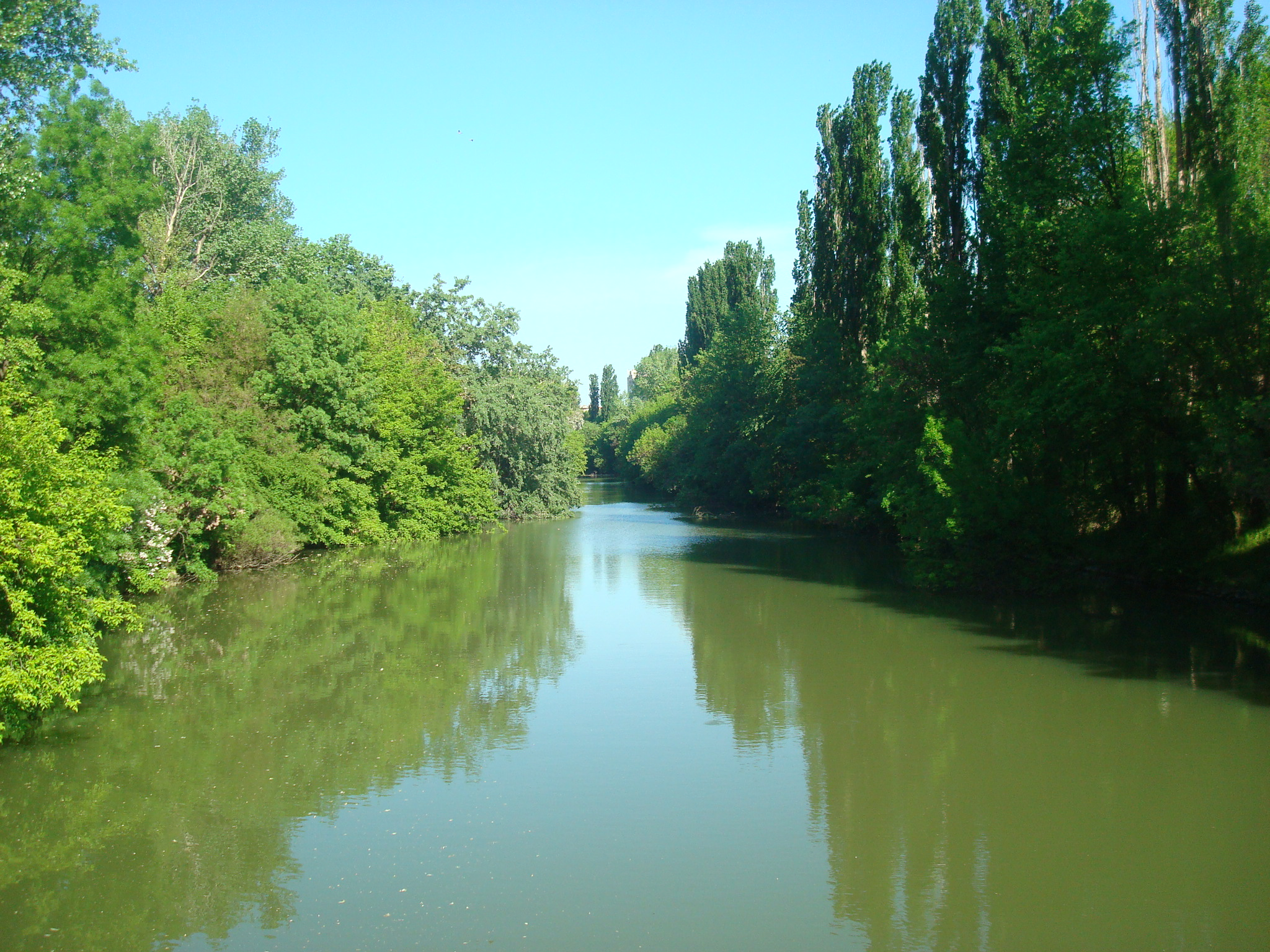 Elven Tundzja ved byparken i Jambol.